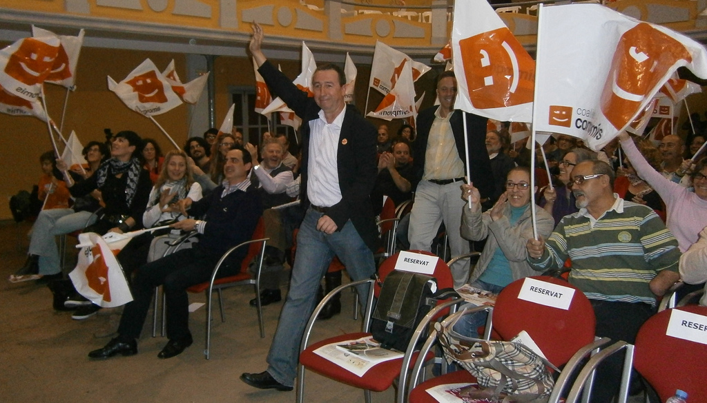 Joan Baldoví al míting central de Compromís a la Campanya de les eleccions generals espanyoles del 2011.